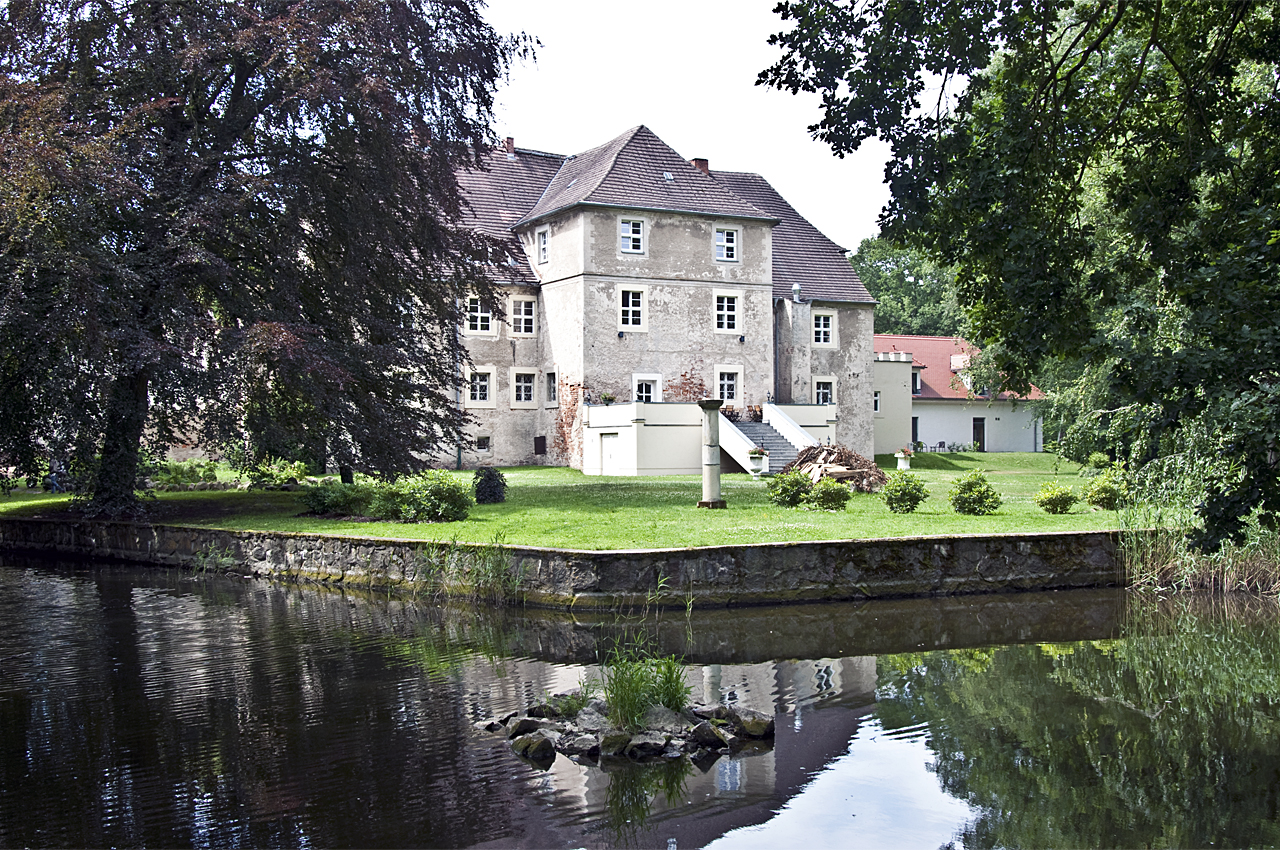 Wasserschloss Mellenthin, Rückseite, 2009